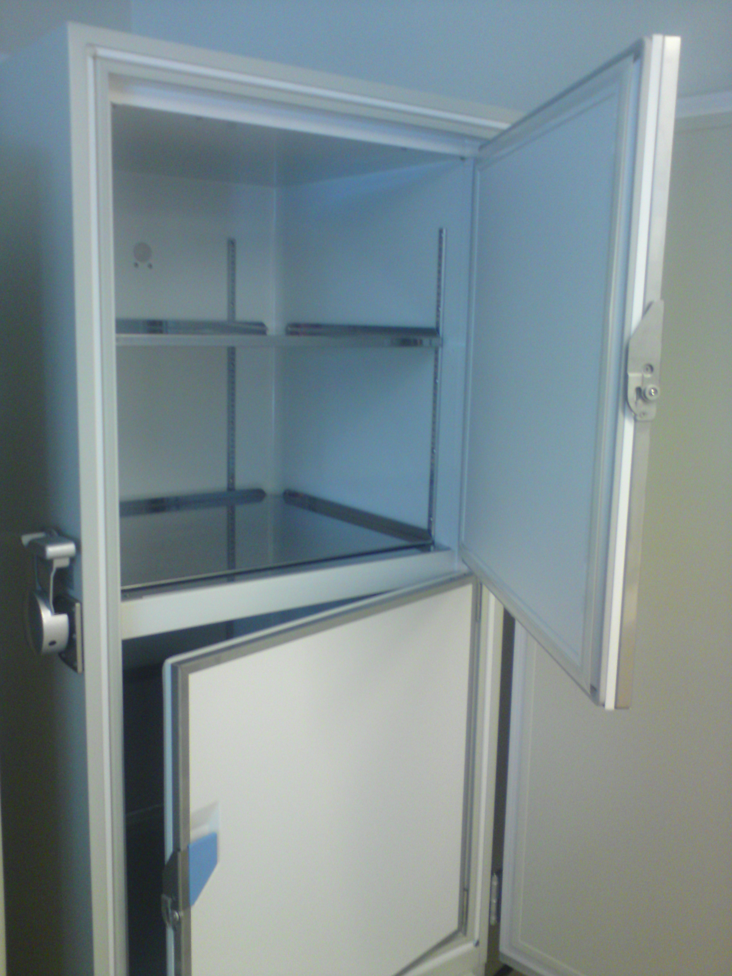 Öppen lågtemperaturfrys (-86°C) med täta innerluckor.